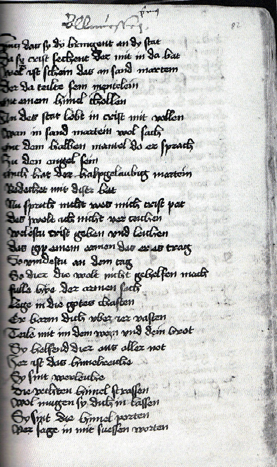 Heinrich von Burgeis: Der Seele Rat, Brixen, Priesterseminar, Cod. R 7